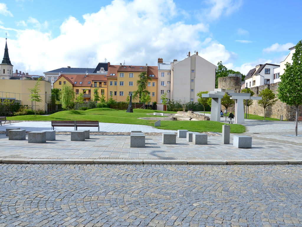 Park Gustava Mahlera, Jihlava